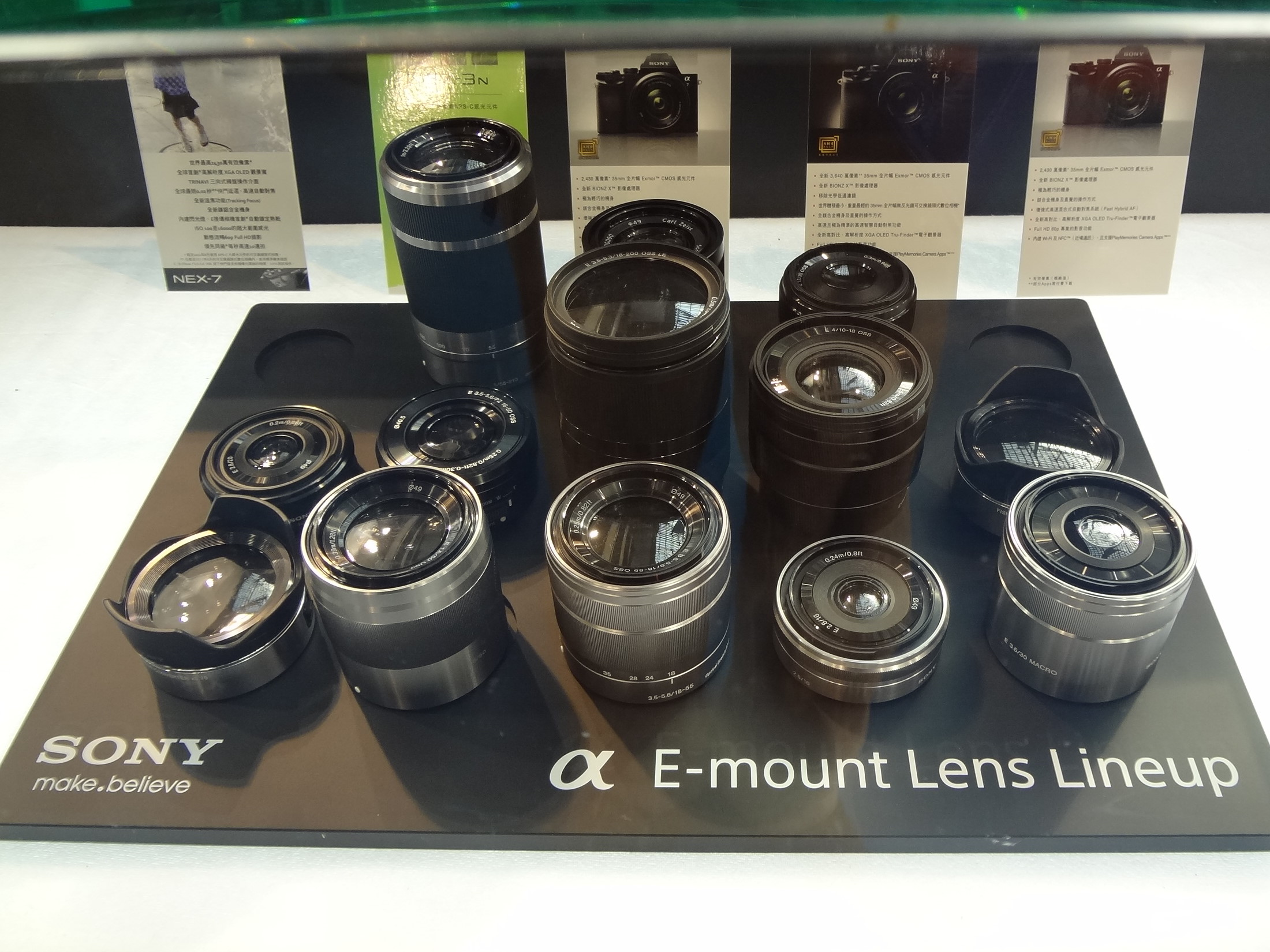 2013年資訊月，Sony攤位展示的E-mount鏡頭。